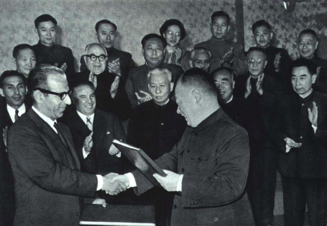 1964-01 1964年 中国阿富汗签署边界条约 阿卜杜·卡尤姆与陈毅签署